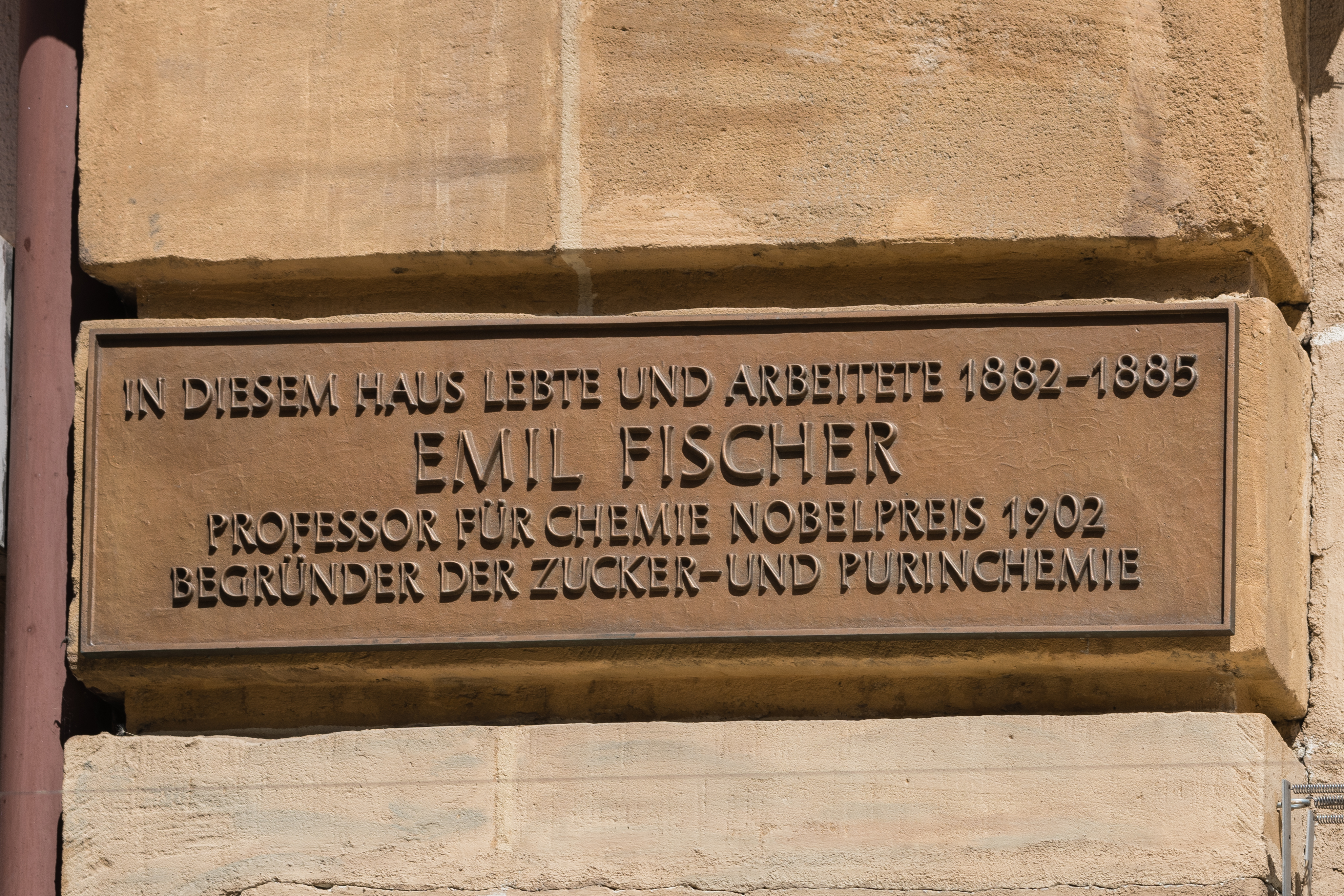 Gedenktafel für Emil Fischer am Haus in der Hauptstraße 26 Erlangen